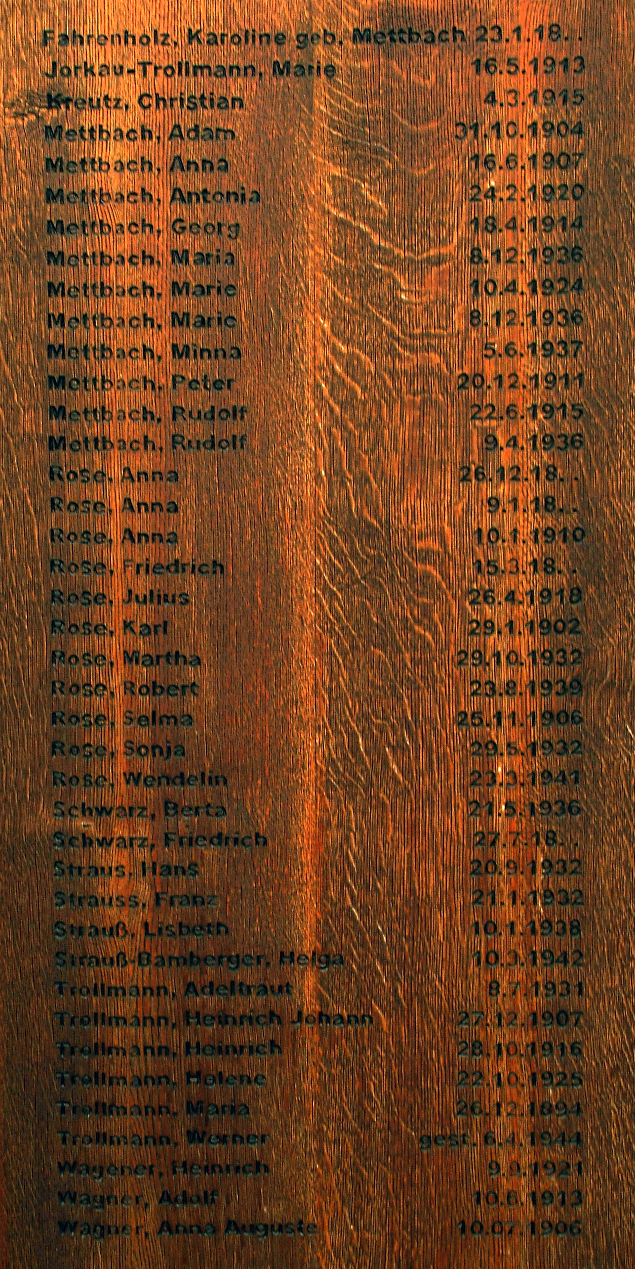 Die linke Tafel am Mahnmal für die Sinti im Altwarmbüchener Moor mit den Namen und - sofern bekannt - Geburtsdaten der von Hannover aus deportierten Sinti